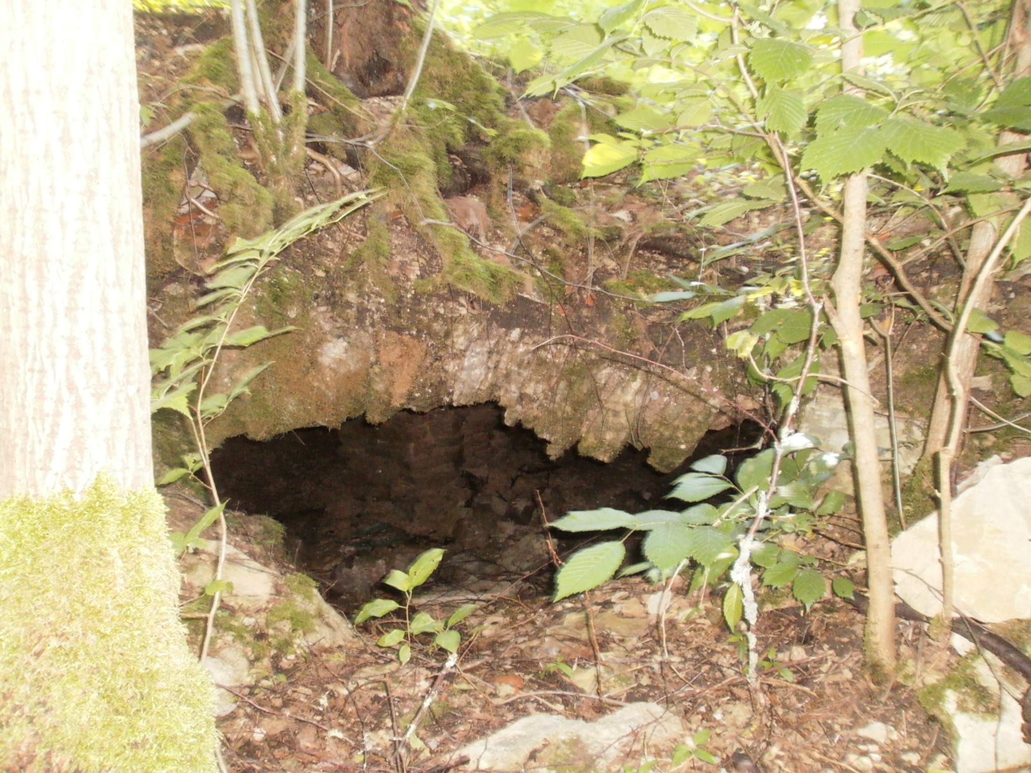 Varisenud keldrilae võlv - praegune sissepääs.